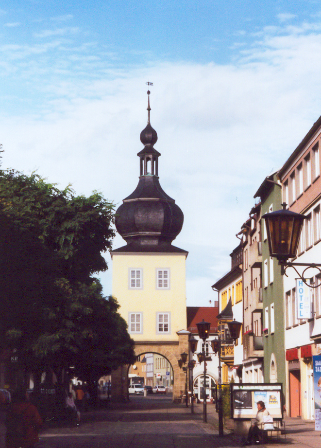 Das Blankenburger Tor im Norden der Saalfelder Altstadt. Benannt nach der Nachbarstadt Bad Blankenburg.